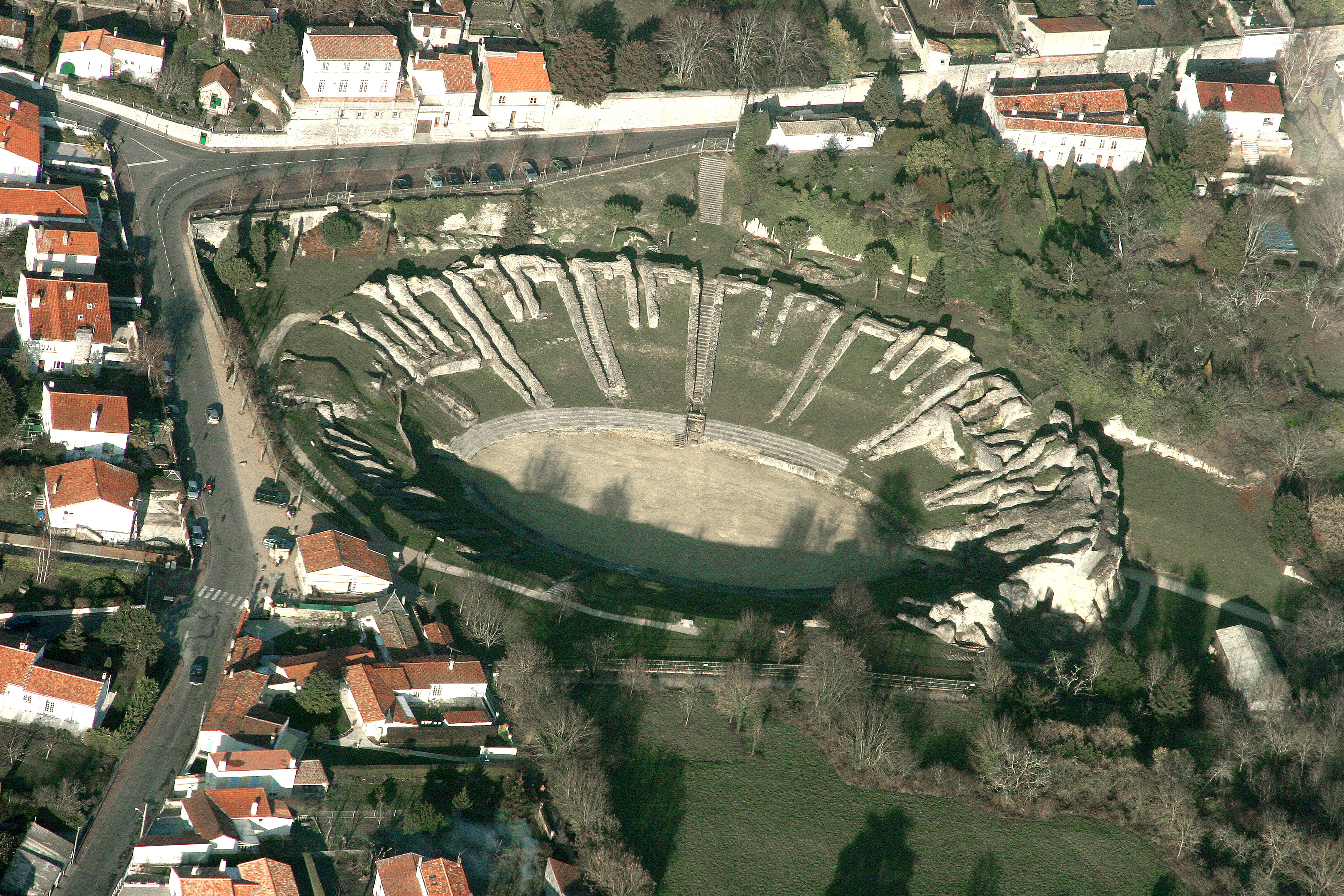 A l'extrémité de la via Agrippa venant de Lugdunum (Lyon), Mediolanum, capitale des Santons, possédait un amphithéâtre imposant de 126 mètres de longueur. Il pouvait accueillir 15000 spectateurs pour les différents combats qui s'y déroulaient. .